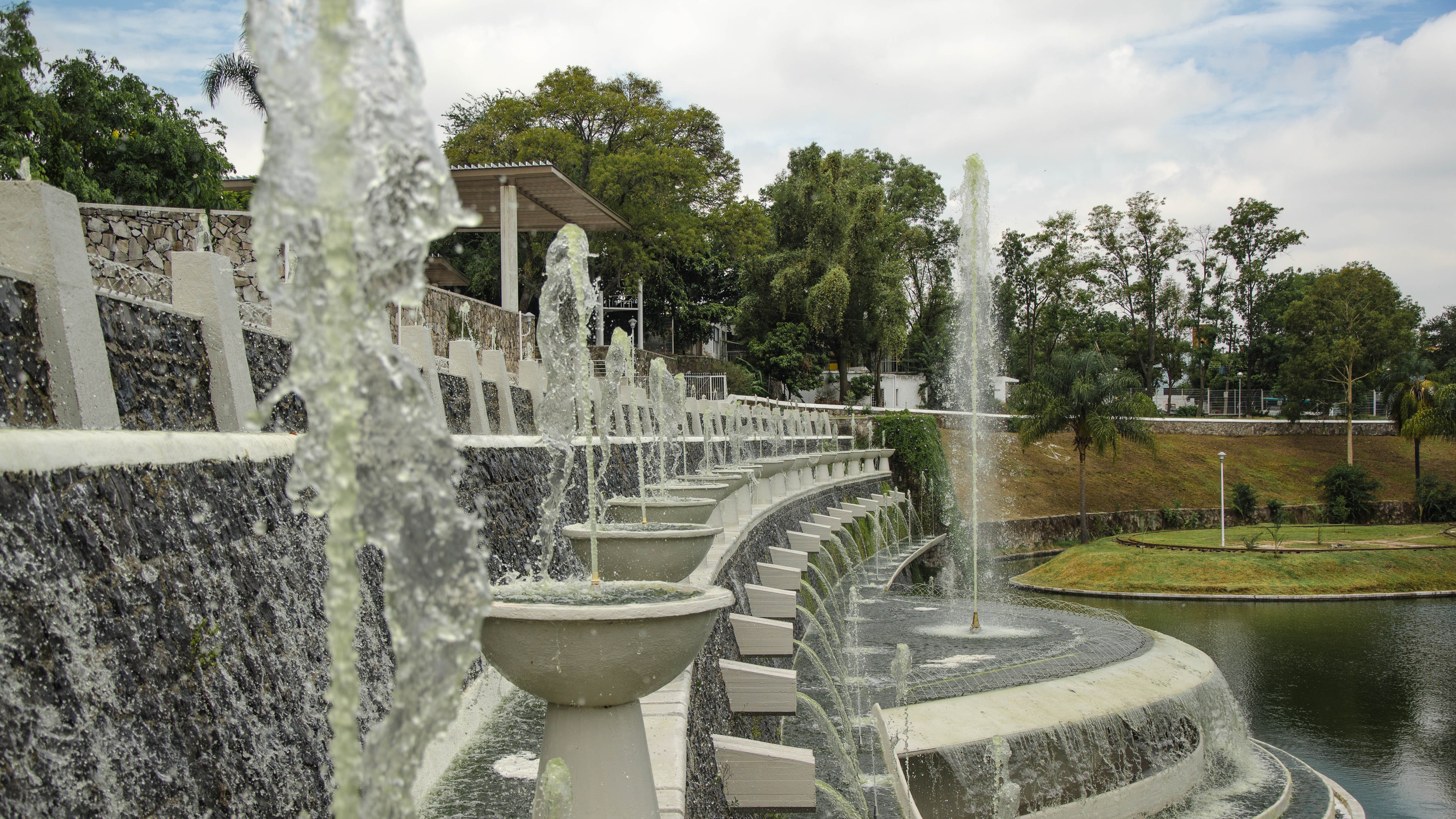 Parque Rehilete Alcalde, Guadalajara, Jalisco México